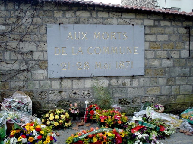 Mur des Fédérés, Père Lachaise Cemetery, Paris, France.